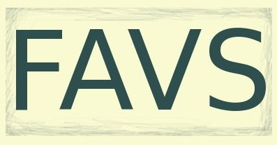 Logo de FAVS